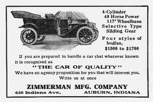 1911 advertisement for the Zimmerman Z-40 automobile. A 1912 model, the Z-40 featured a 292.1 ci 4 cylinder engine. The pictured touring car cost $1600.